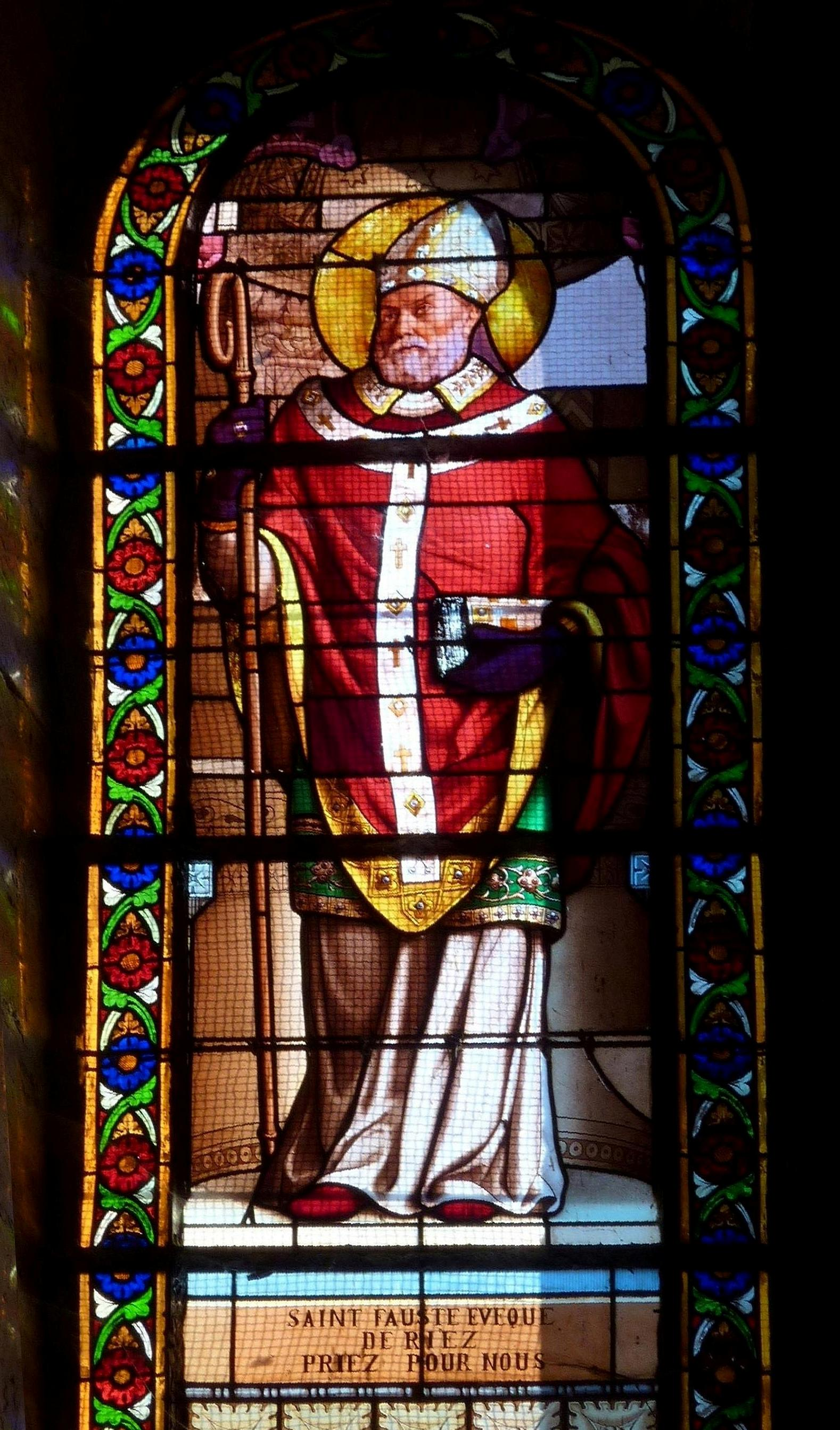 Bleiglasfenster in der Kirche Notre-Dame de l'Assomption in Riez, Darstellung: hl. Faustus von Riez